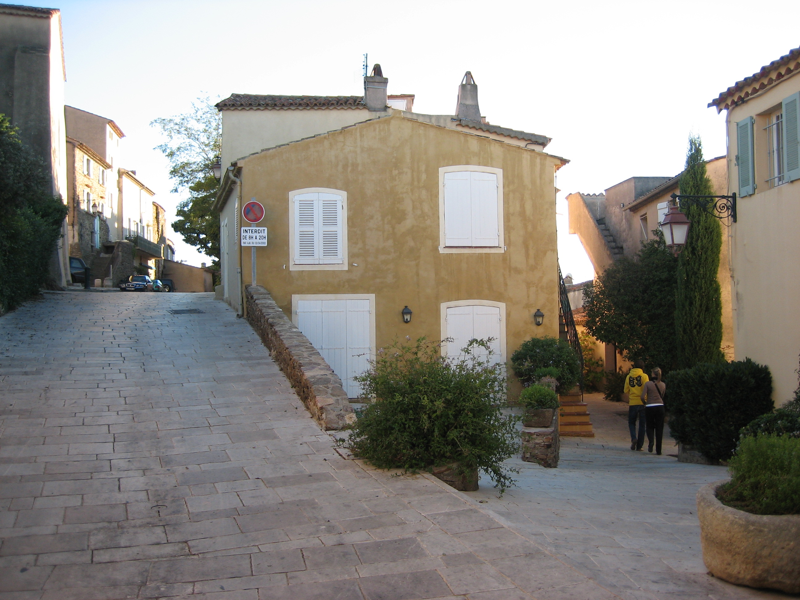 Gassin